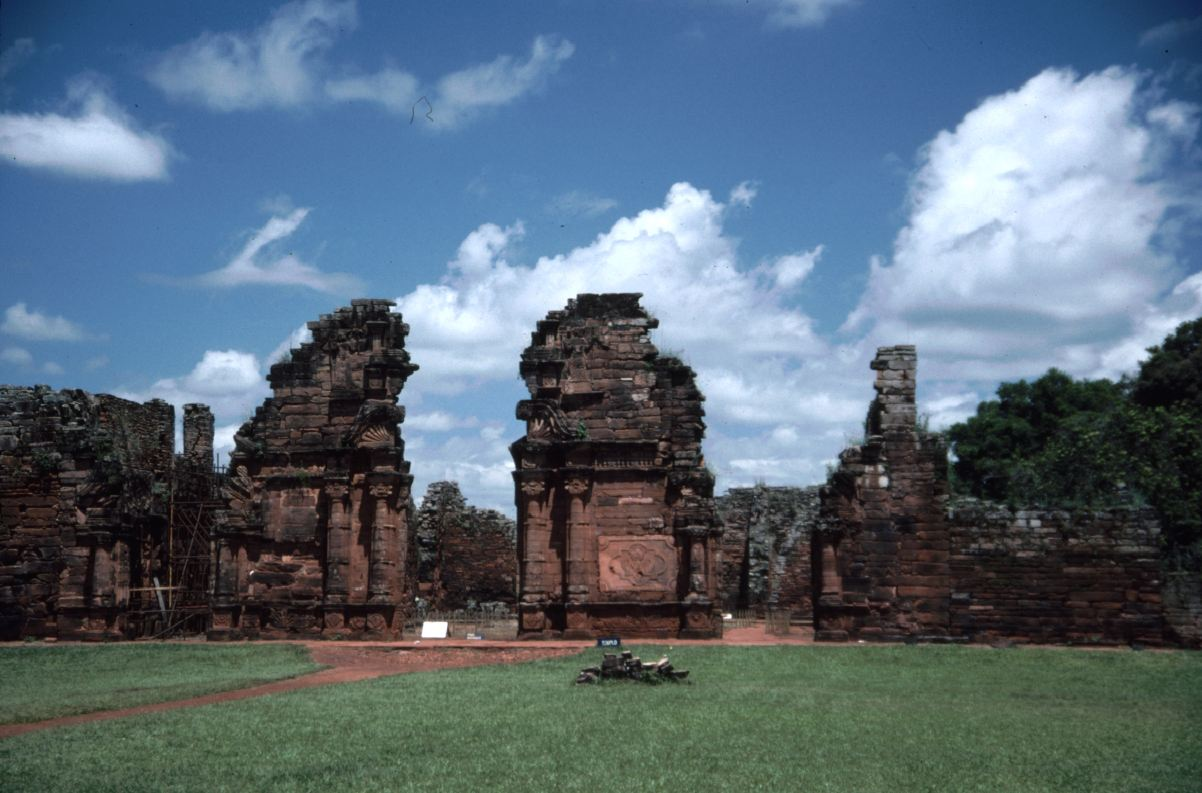 San Ignacio Mini, Missiones, Argentina